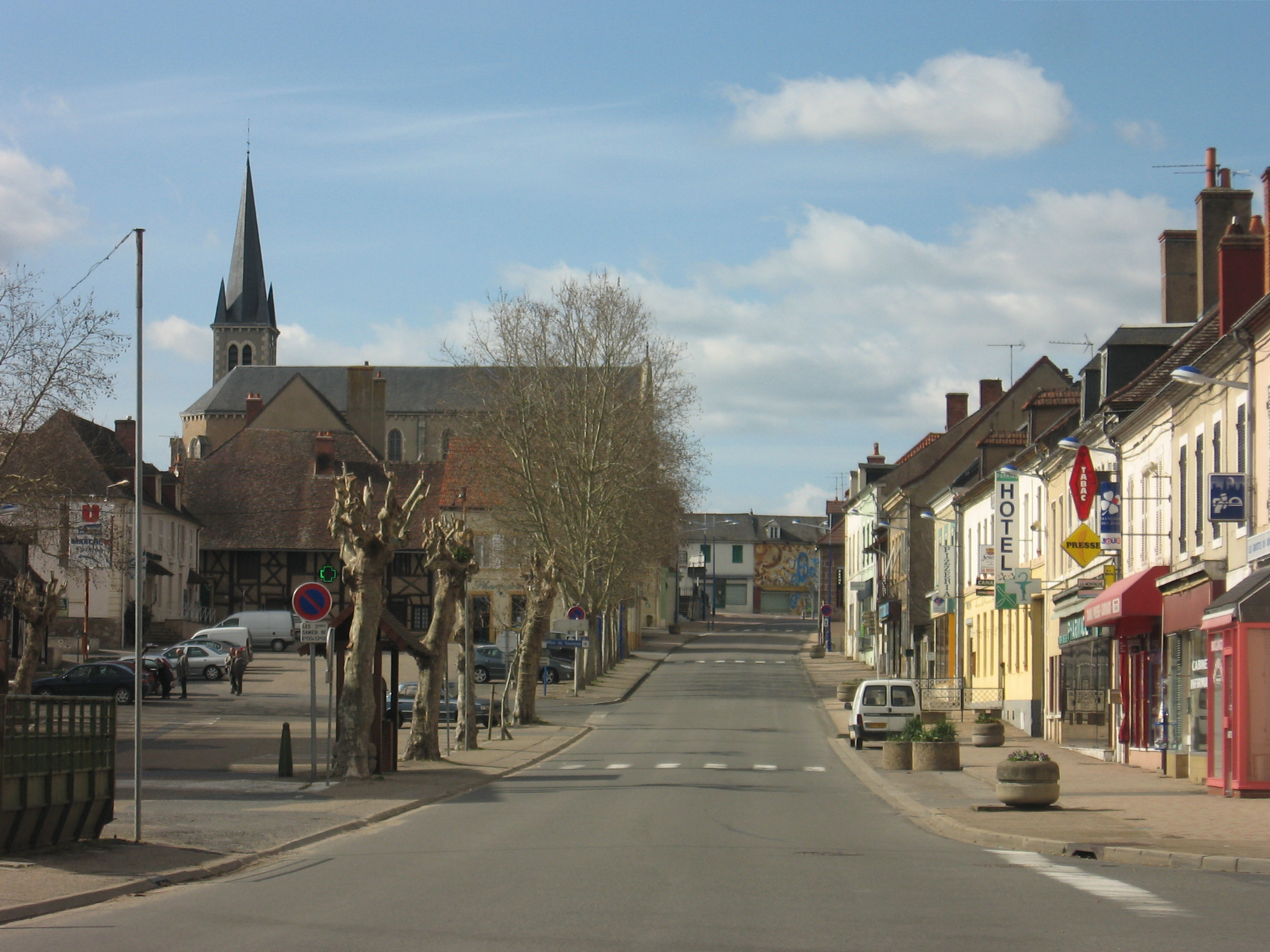 Dompierre-sur-Besbre, Allier